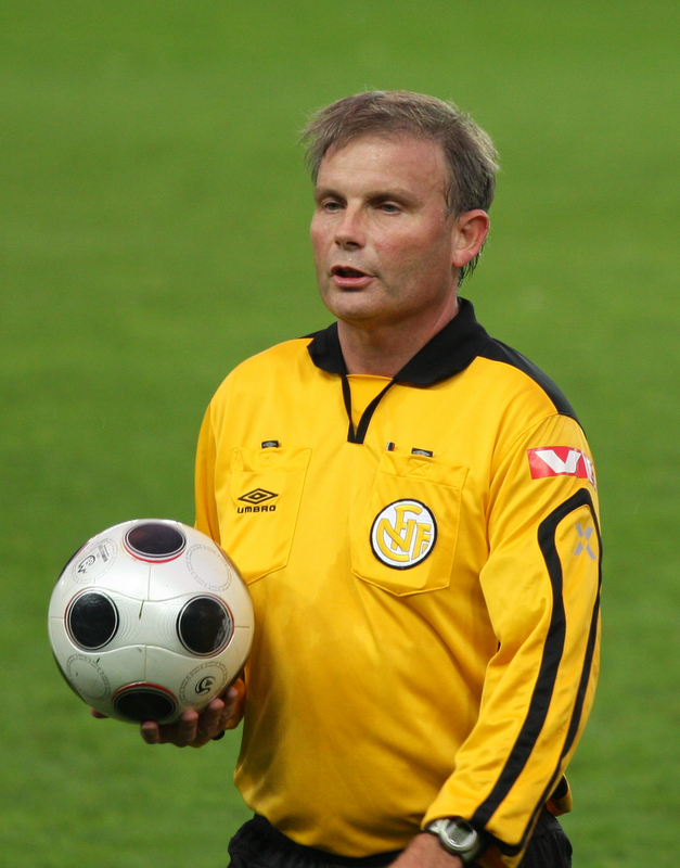 Roy Helge Olsen, Norwegian referee